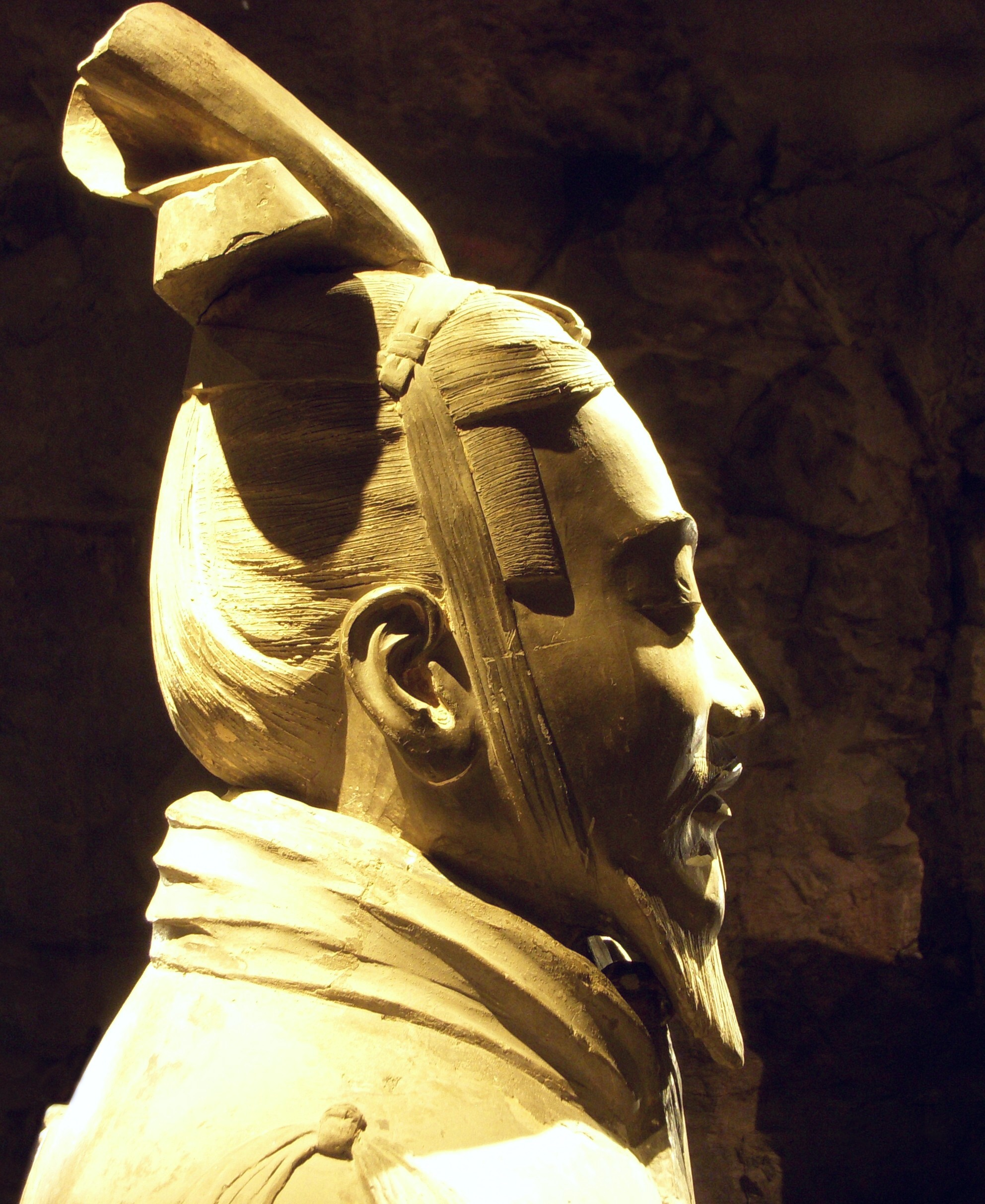 Terrakottaarmén, General (Östasiatiska museet, Stockholm)